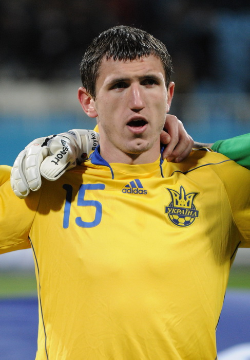 Сергей Кривцов, украинский футболист, защитник донецкого «Шахтёра»